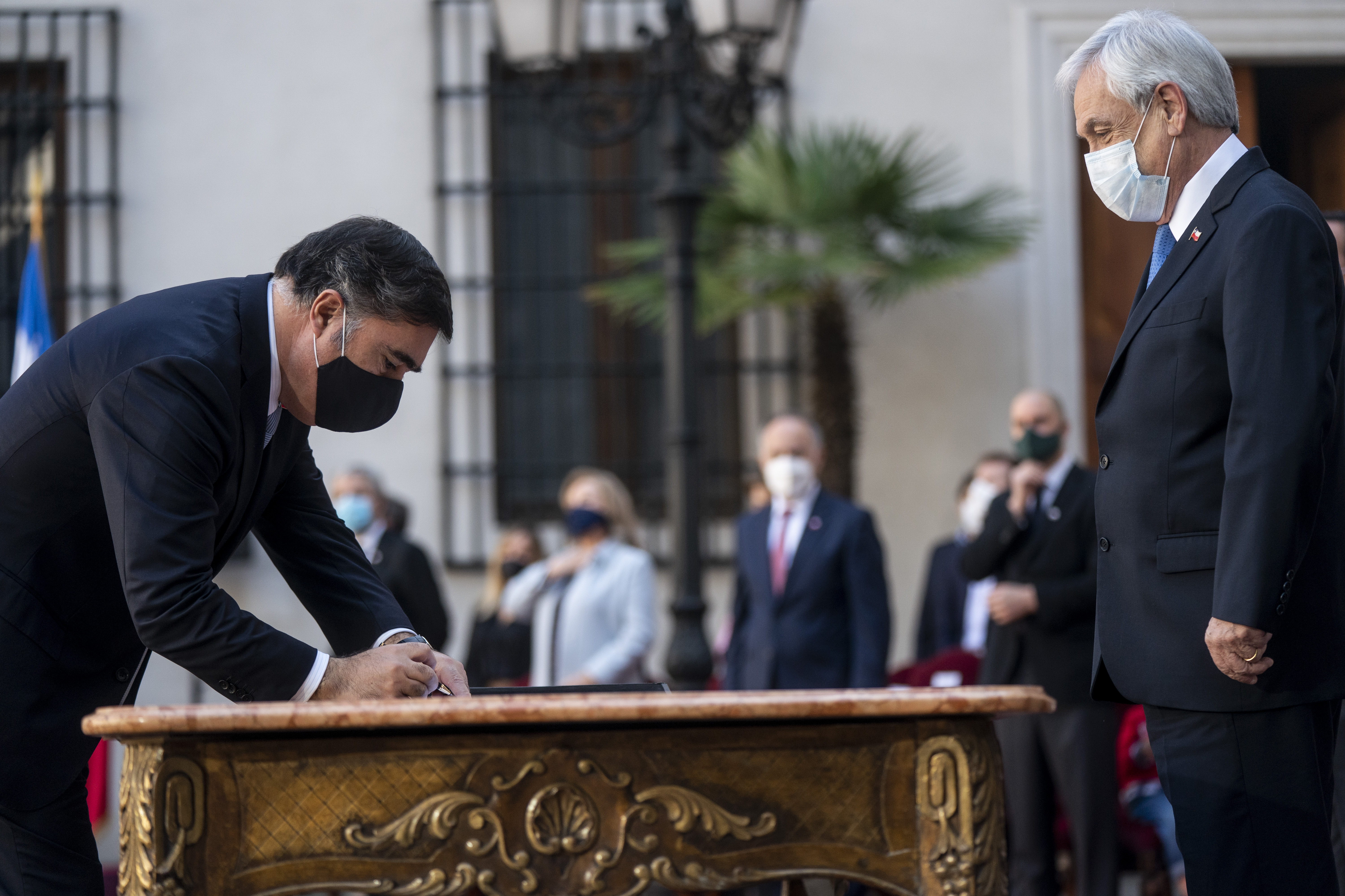 Mario Desbordes firma frente al presidente Sebastián Piñera el decreto que le nombra Ministro de Defensa de Chile.